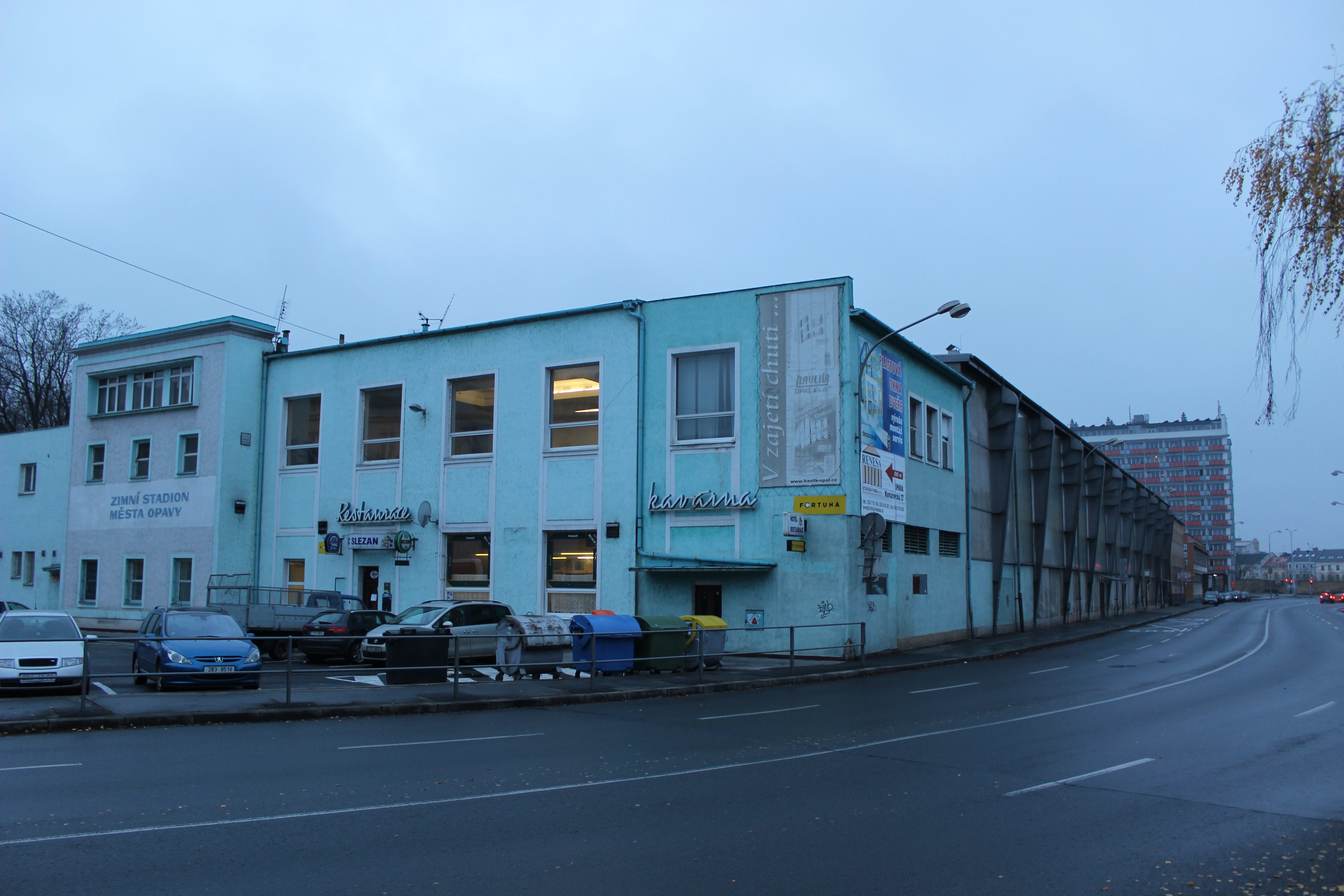 Zimní stadion v Opavě (pohled od východu).